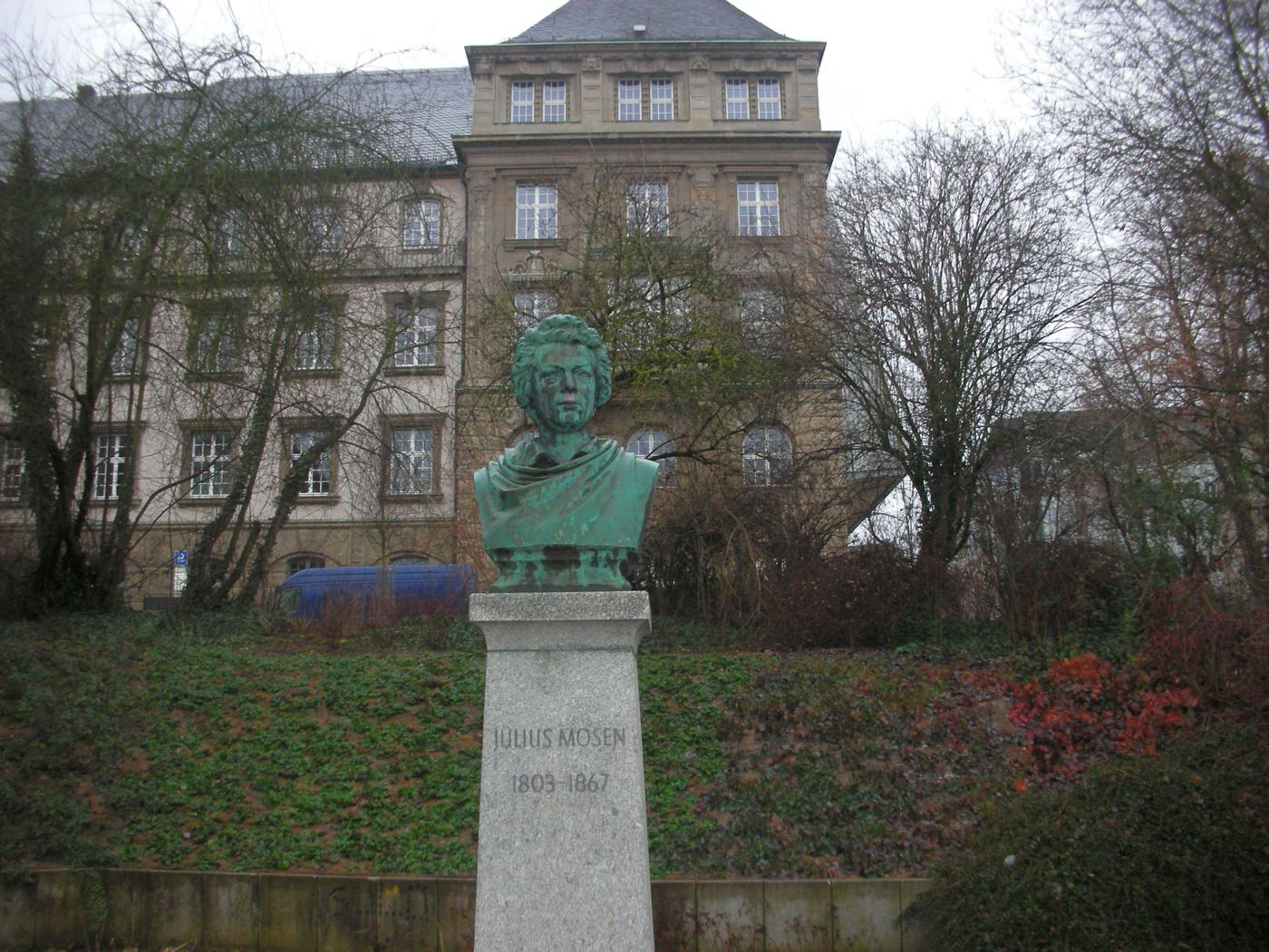 Plauen, denkmalgeschützte Büste Julius Mosens von Gustav Adolph Kietz am Unteren Graben zwischen Postplatz und Herrenstraße. Im Hintergrund ist das Neue Rathaus zu sehen.